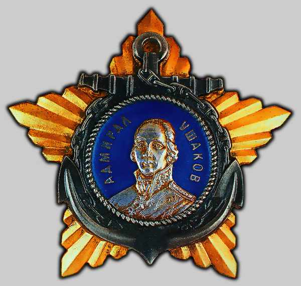 Орден Ушакова 2-ой степени, орден изготовлен по эскизу архитектора М.А.Шепилевского.